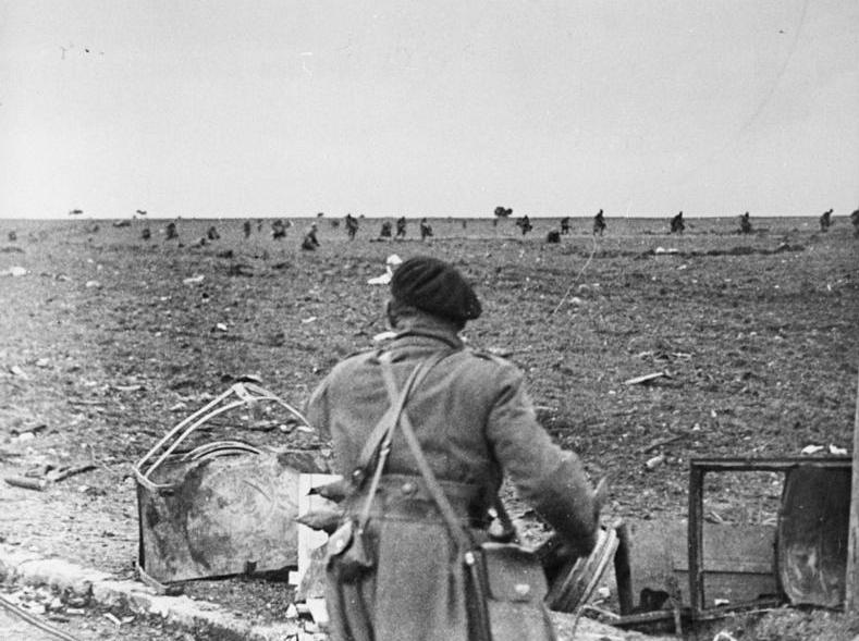 ADN-ZB Spanischer Freiheitskampf 1936 - 39 Anfang März 1937 begann die grosse Offensive der faschistischen Franco-Truppen auf Guadalajara, deren Hauptstoss auf der Strasse Madrif - Saragossa (Carretera de Aragon) geführt wurde. 3961-37